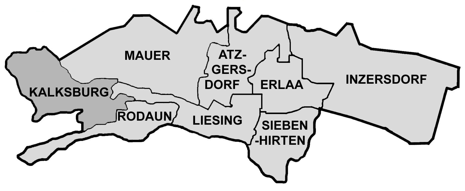 Positionskarte des Liesinger Bezirksteils Kalksburg in Wien